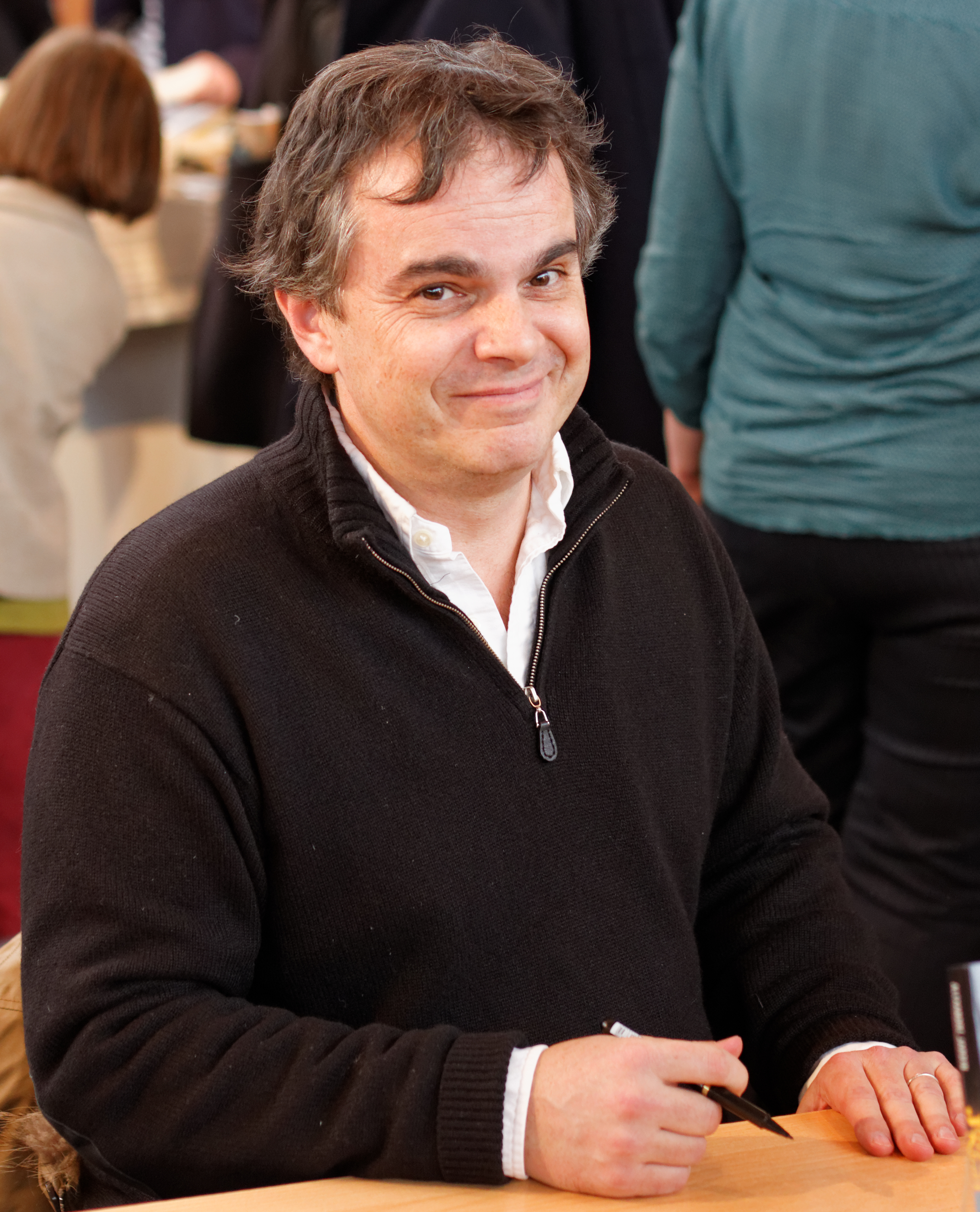 Alexandre Jardin, salon du livre de Paris, 2013